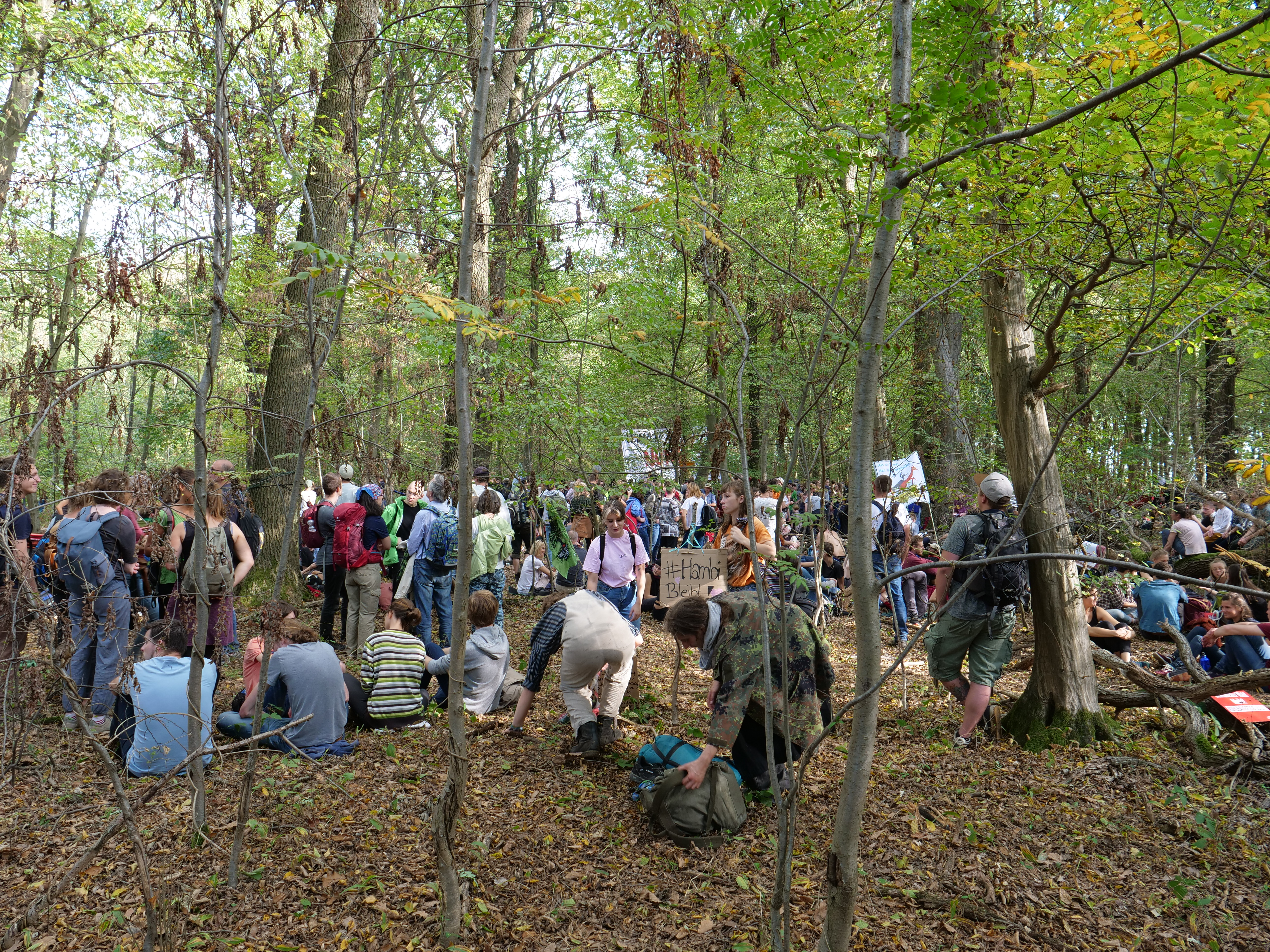 Aktion von "Ende Gelände" zur Wiederbesetzung des Hambacher Forstes am Rande der "Wald retten - Kohle stoppen!" Kundgebung.